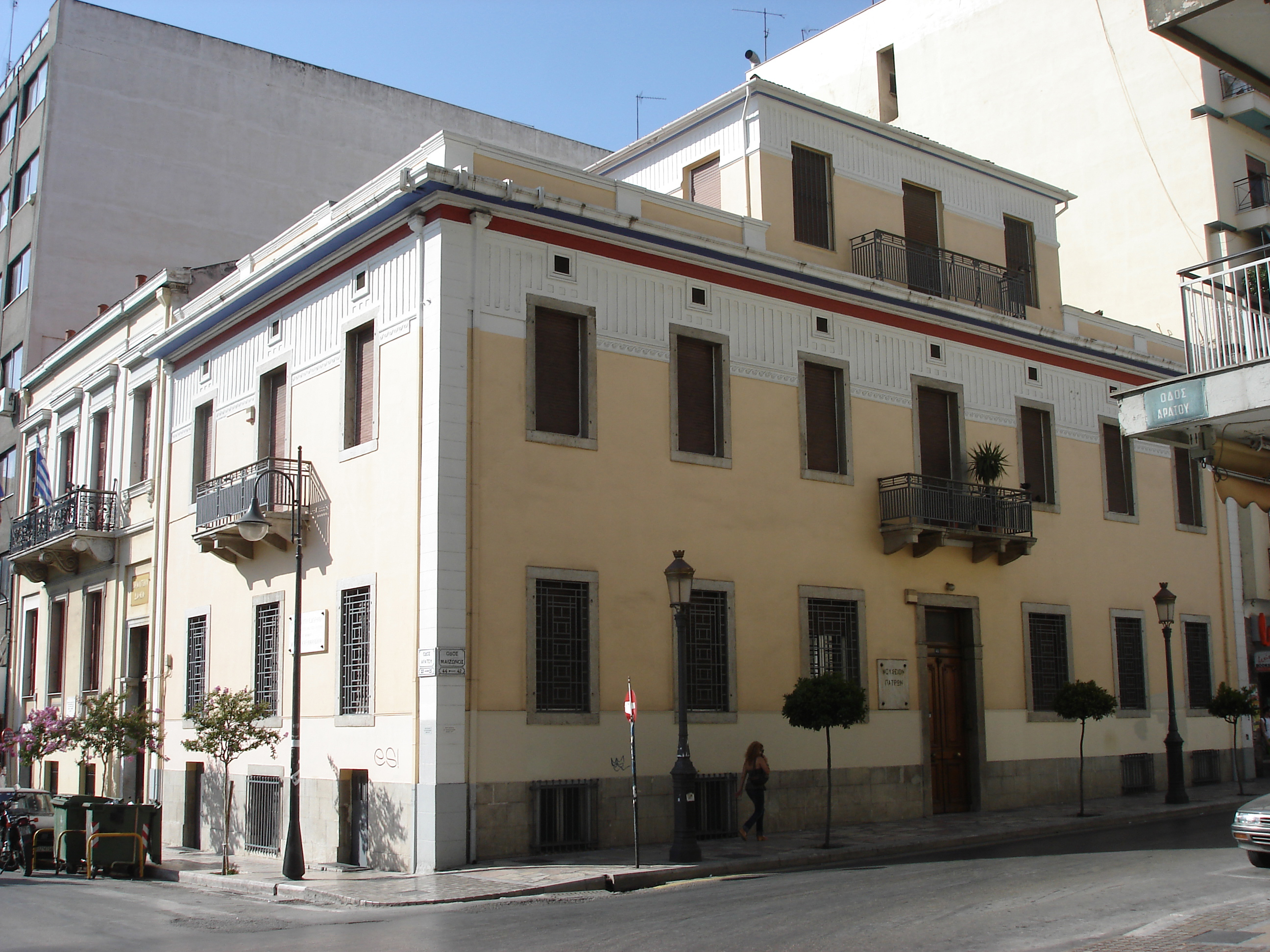 House Ioannis Karamandanis , old Museum Patras, Οικία Ιωάννη Καραμανδάνη, Παλιό Αρχαιολογικό Μουσείο Πάτρας